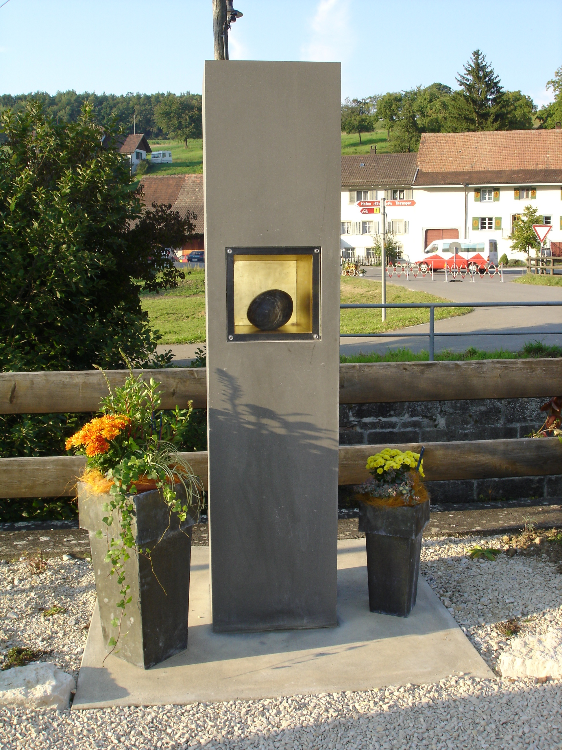 Skulptur einer Zwetschge, der Sorte "Schöne von Bibern". Standort: Bibern SH